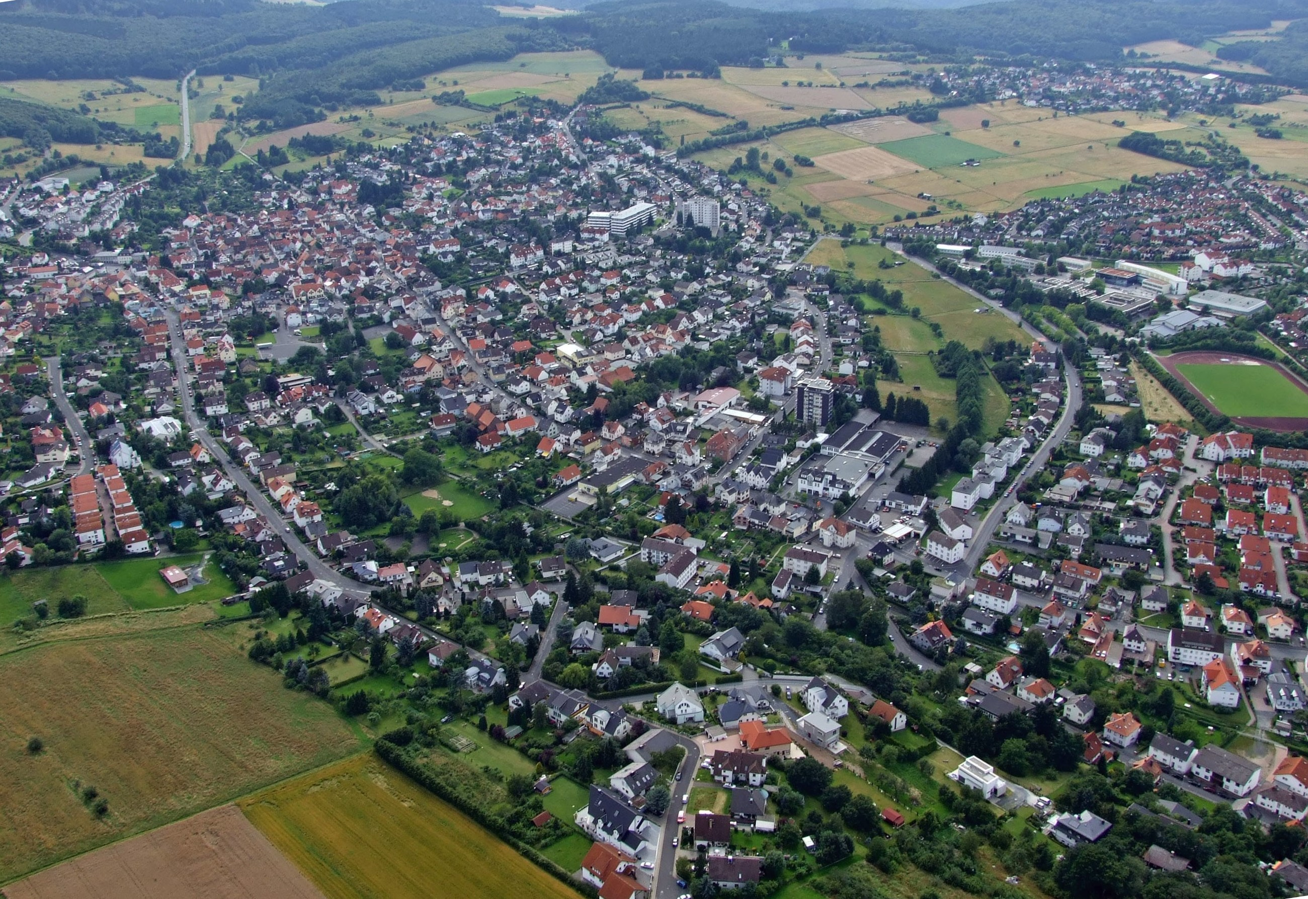 Neu Anspach aus der Luft